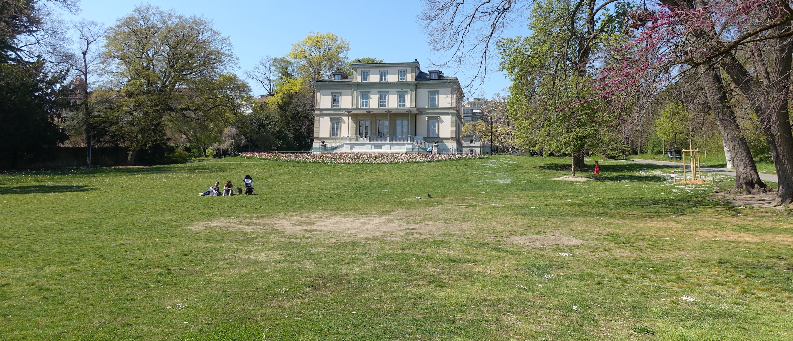 Villa Moynier, dans le parc du même nom, à Genève.